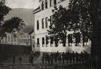 Solheim skole. Årstall ukjent. Fotograf ukjent. Fra arkivet etter Solheim skole.